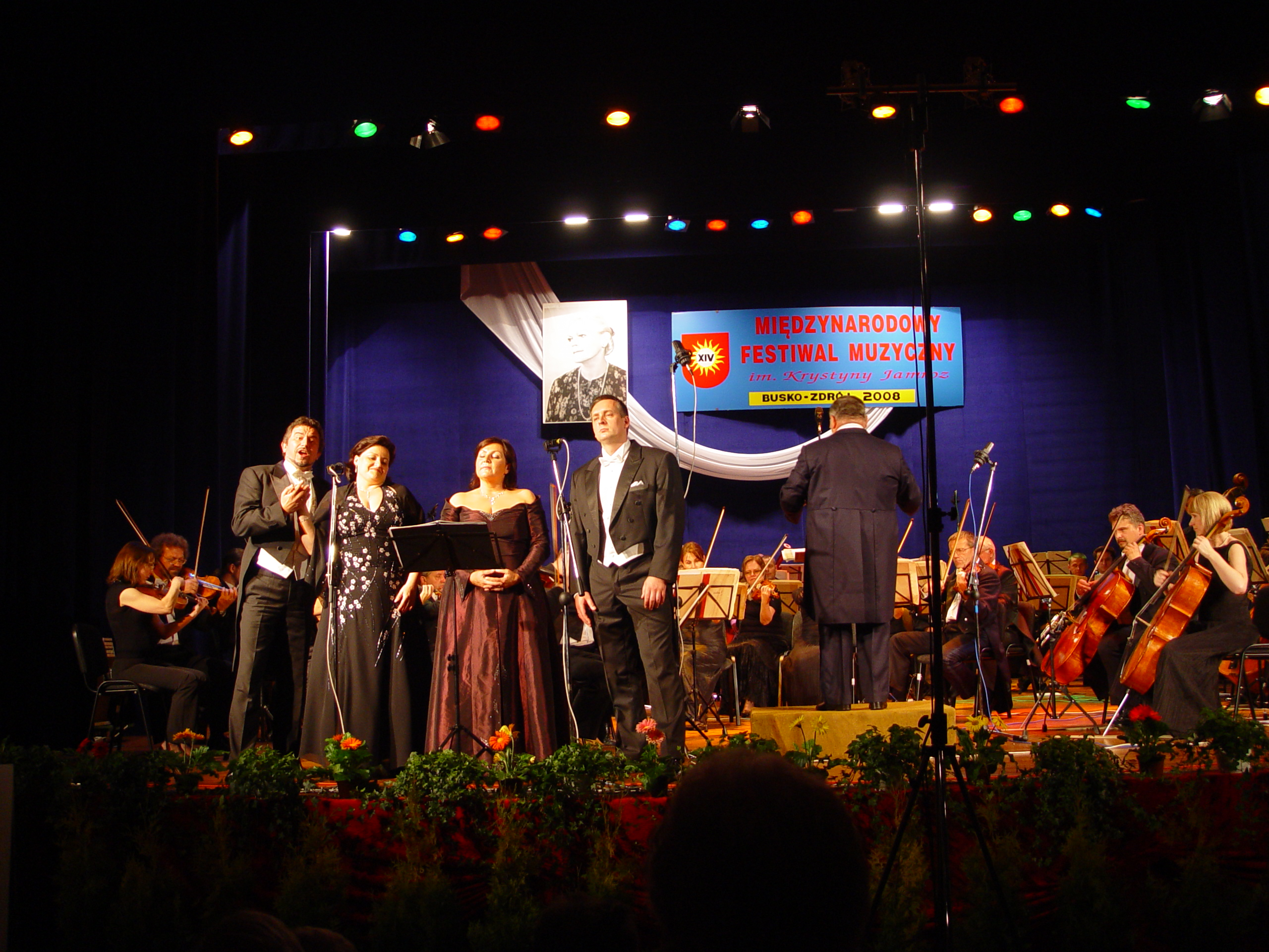 Międzynarodowy Festiwal Muzyczny im. Krystyny Jamroz w Busku-Zdroju, XIV edycja, BSCK, 4 lipca 2008 r.